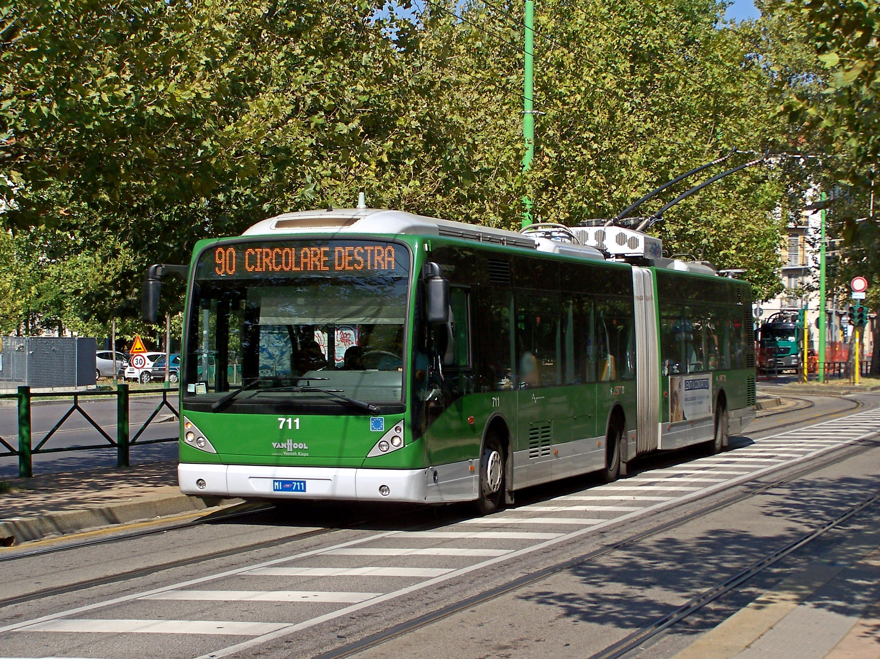 Il filobus Van Hool AG 300 T nr. 711 dell'ATM in viale Tibaldi nel tratto comune fra la circonvallazione filoviaria di Milano e la linea tranviaria 15, mentre espleta servizio sulla linea 90 (Circolare Destra)